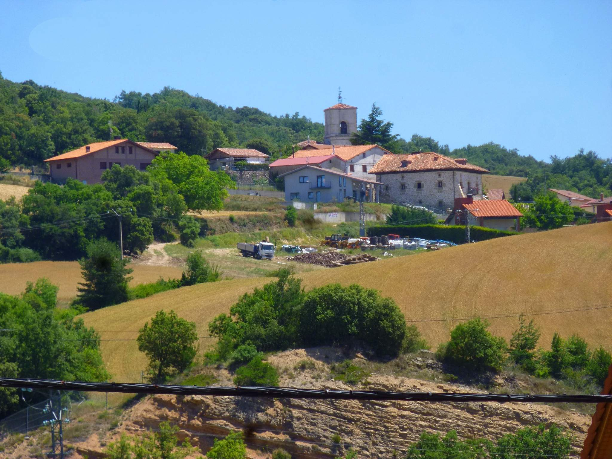 Anuntzeta/Anúcita (Ribera Alta, Álava)